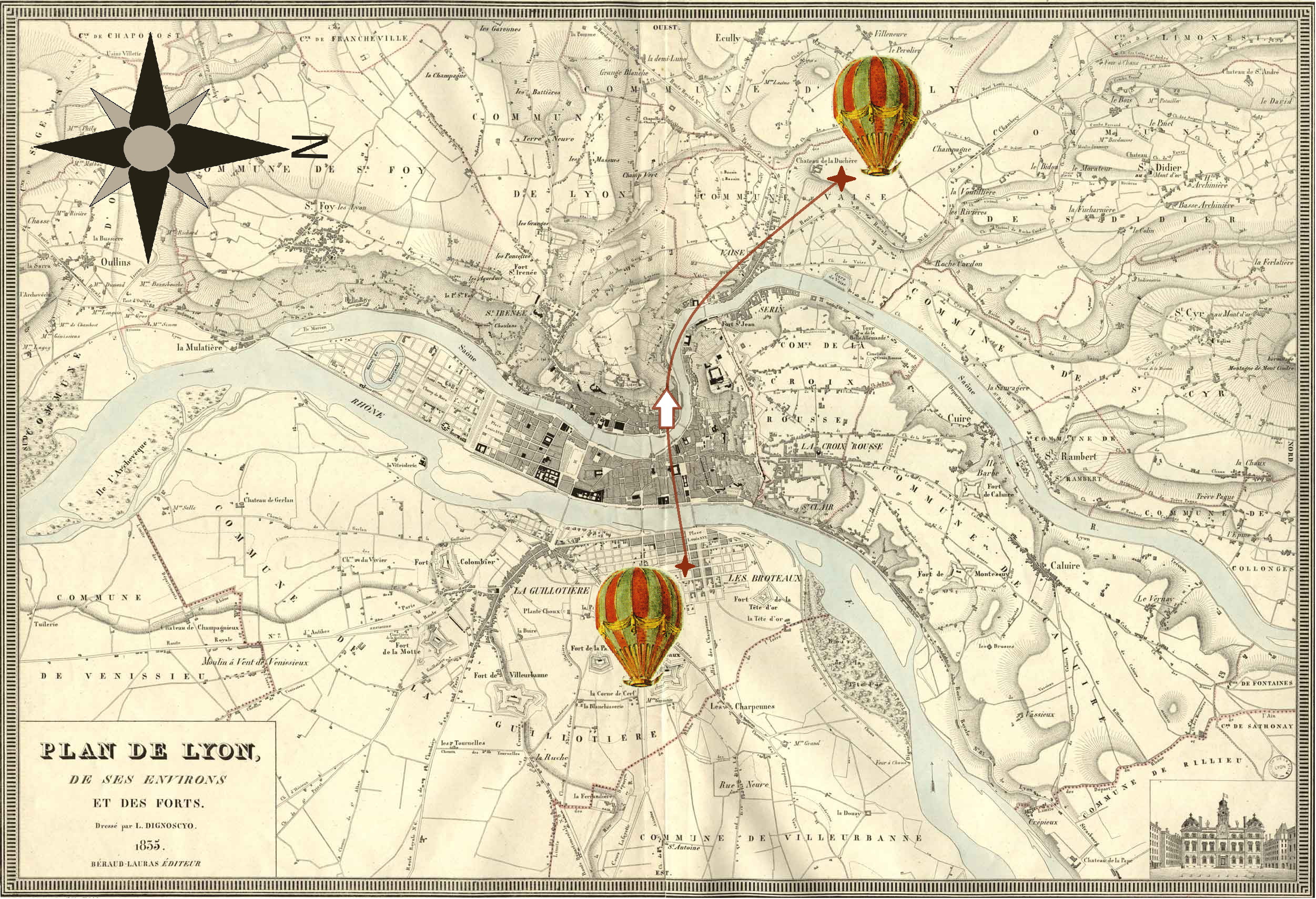 Vol historique de la mongolfière La Gustave, le 4 juin 1784, sur le Plan de Lyon, de ses environs et de ses forts, L. Dignoscyo, 1835, éditeur Béraud-Lauras. Travail personnel. Source cité sur la page WP La Gustave. Image de mongolfière : carte à jouer Grimaud, valet, de la collection Les Mongolfières, légende La Gustave